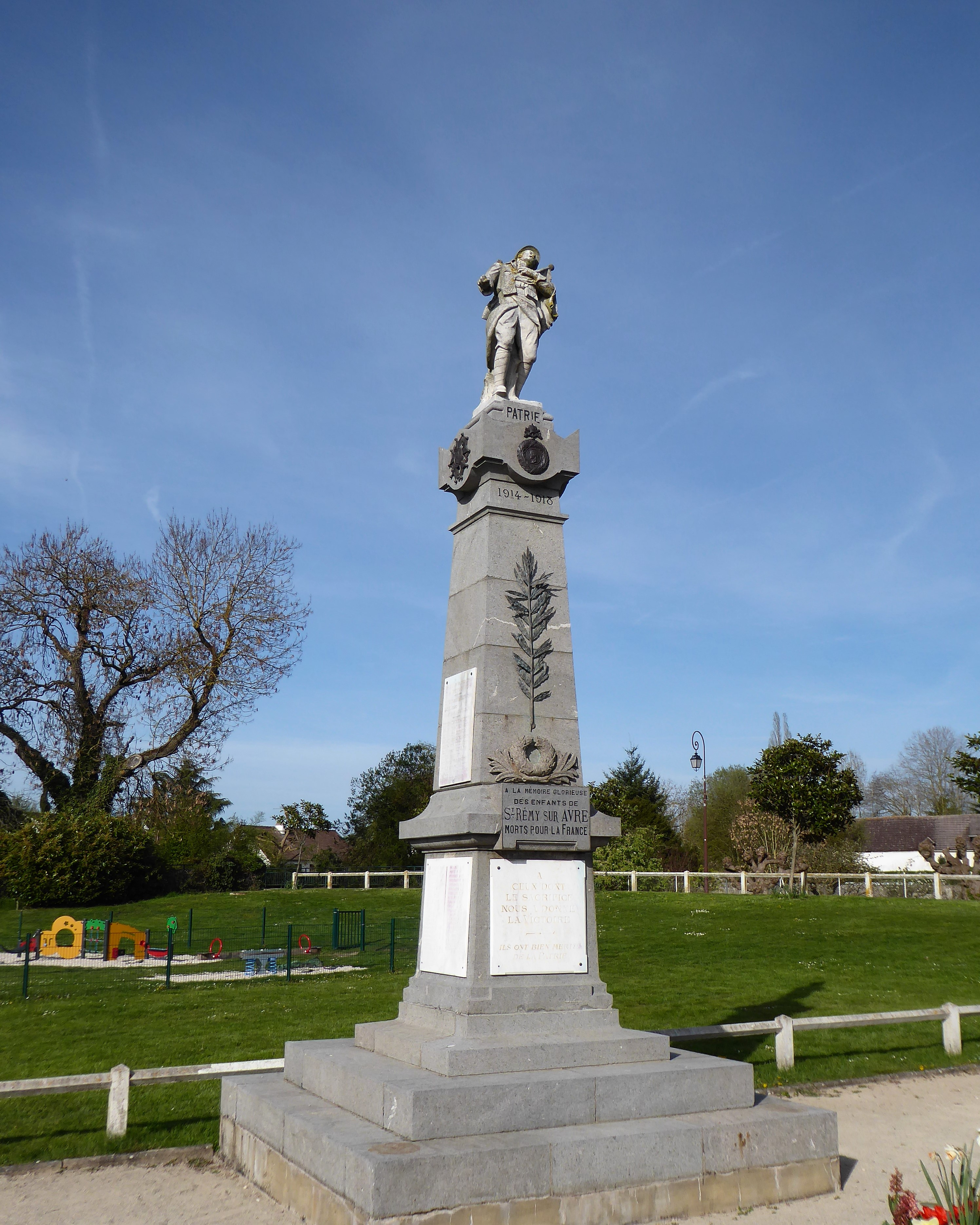 Monument aux morts de Saint-Rémy-sur-Avre, Eure-et-Loir, France.